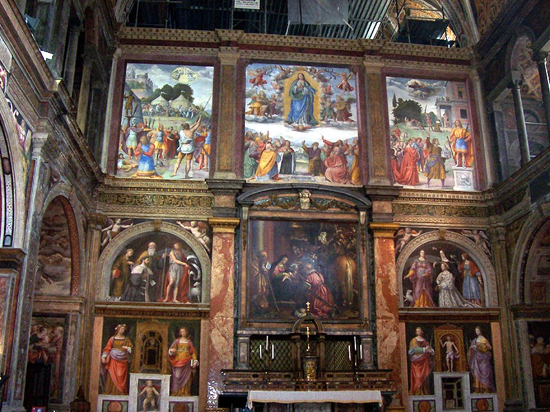 Milano - Affreschi di Bernardino Luini nel Monastero Maggiore (S. Maurizio)